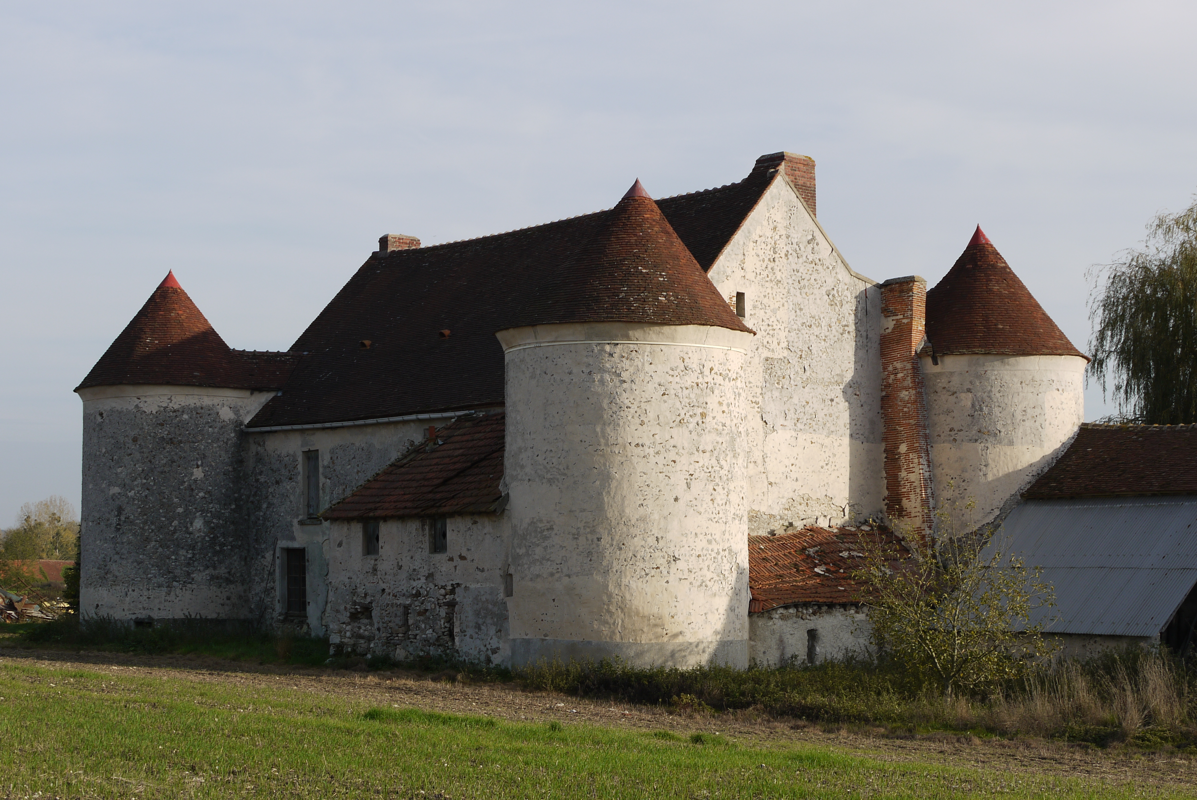 Ferme de Villefontaine, Marchais-en-Brie